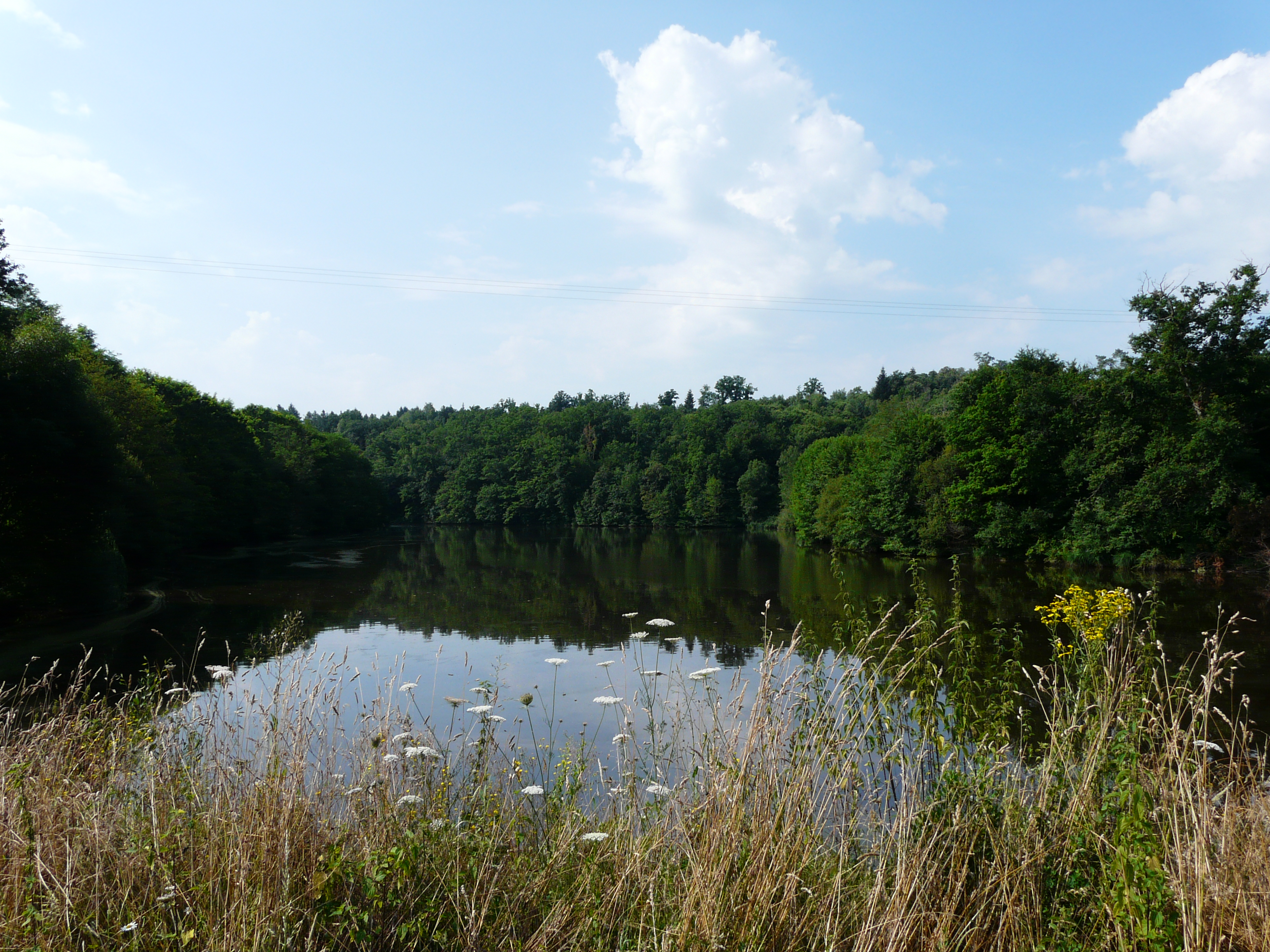 L'étang des Petits Moulins alimenté par le Trieux, Champniers-et-Reilhac, Dordogne, France.